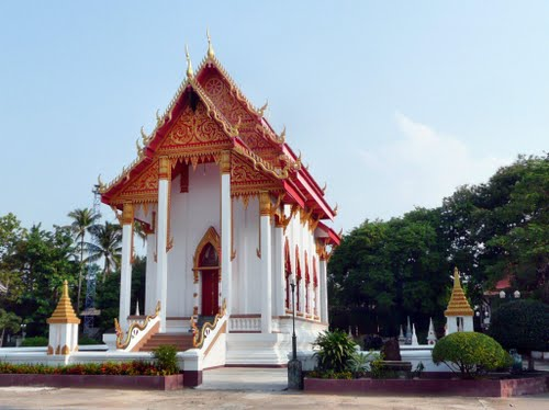 พระอุโบสถวัดสระแก้ว อ.พิบูลมังสาหาร จ.อุบลราชธานี